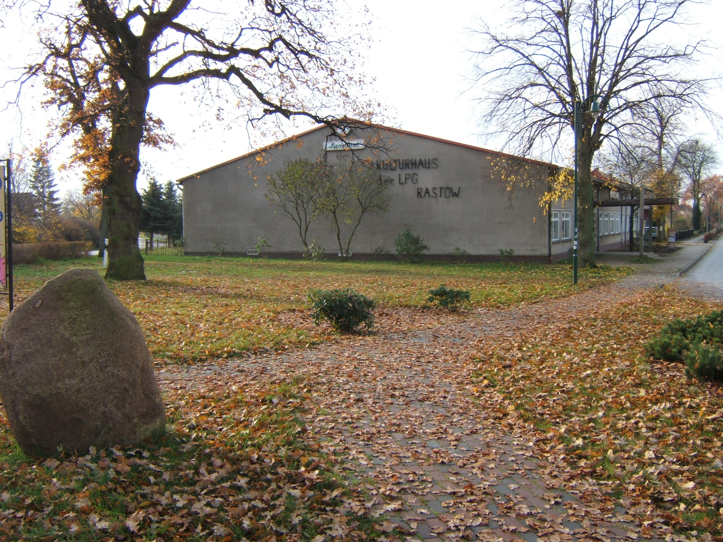 Kulturhaus der ehemaligen LPG Rastow